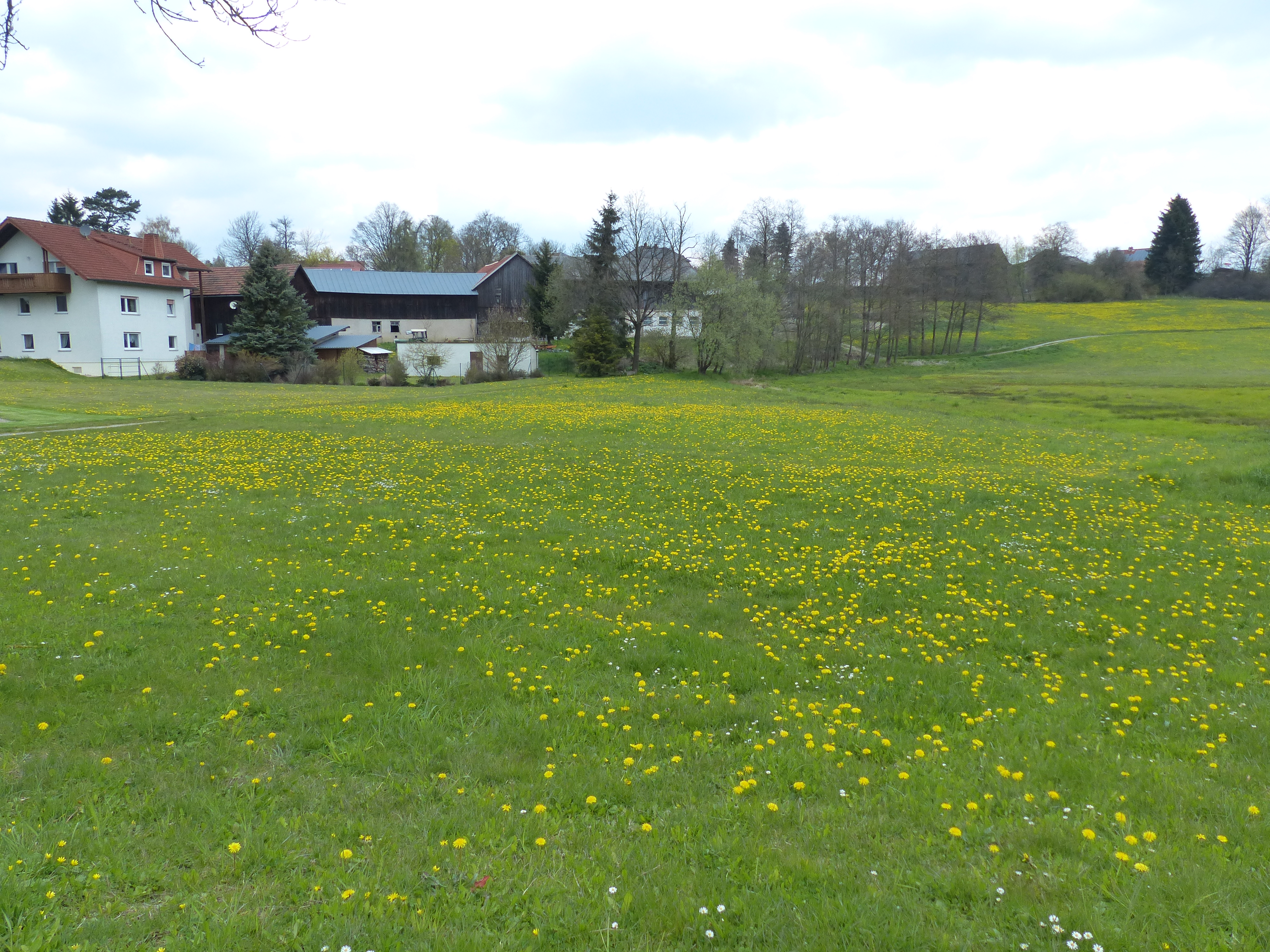 Ortsansicht Nentschau